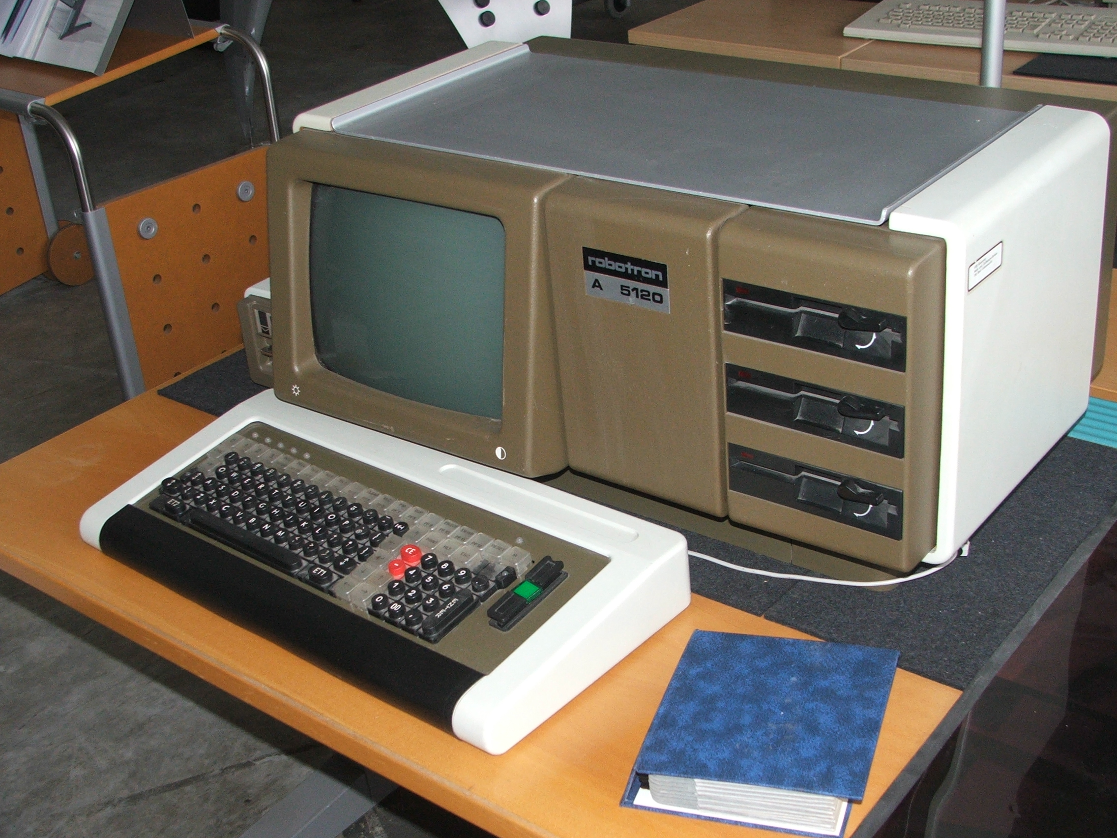 Robotron A5120 im Museum Robert Reiss